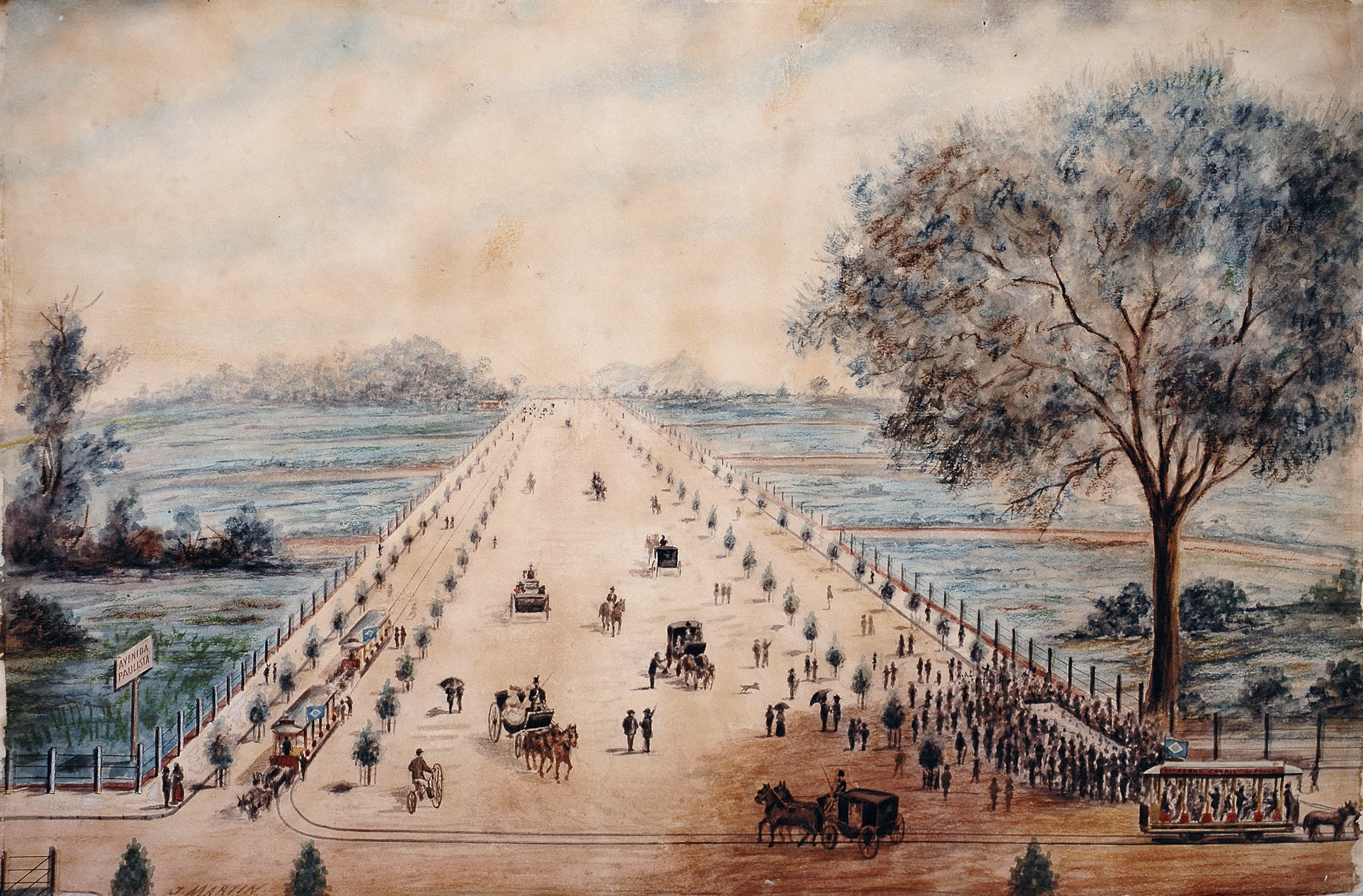 Obra que integra o acervo do Museu Paulista da USP.